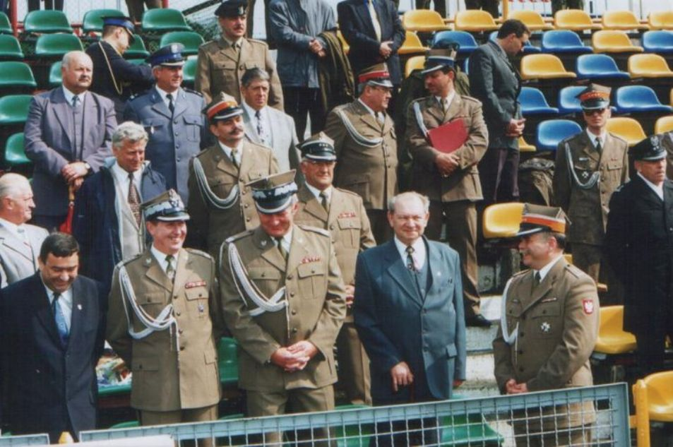 Stargard Szczeciński, 2000r. Były dowodca 15 PTBR płk Wiesław Wroński ( w drugim rzędzie) podczas uroczystości wojskowej